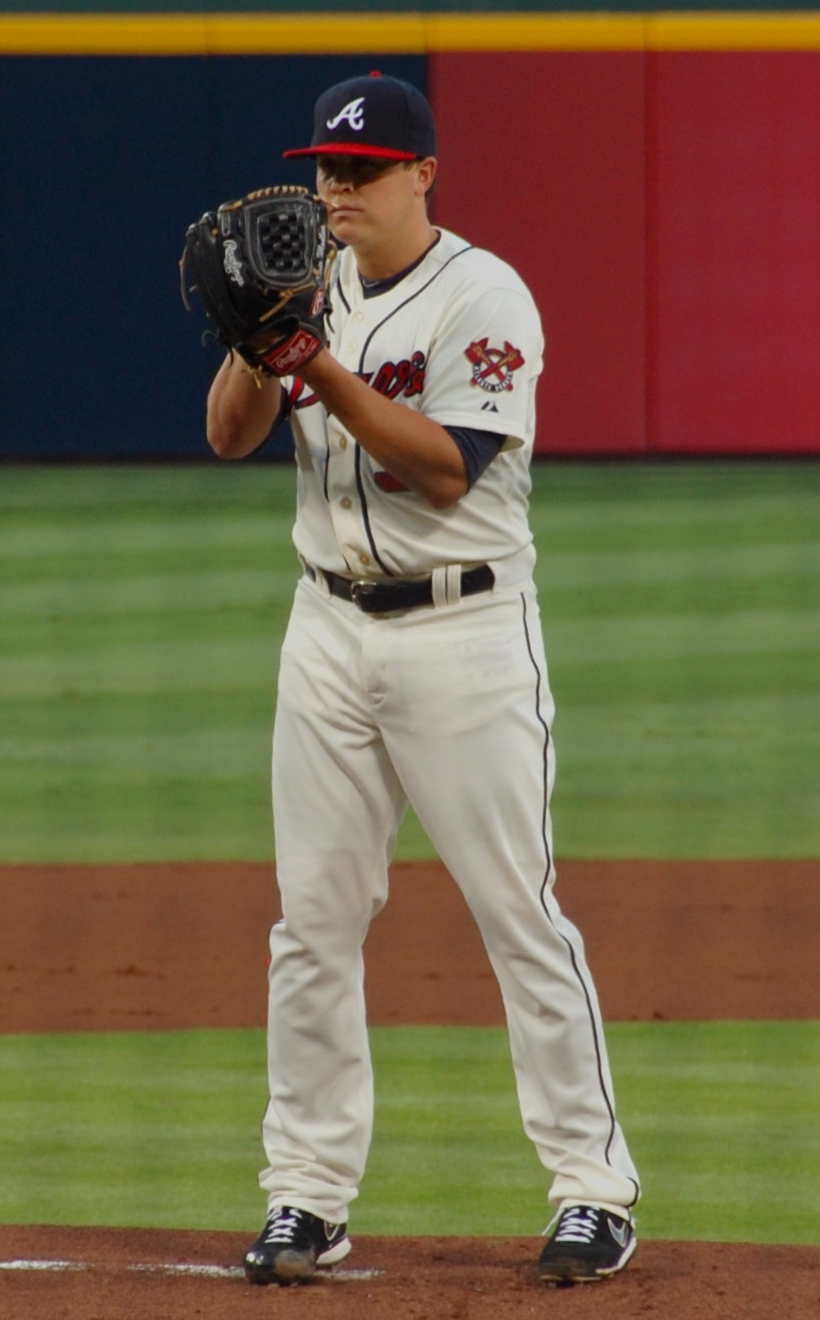 Kris Medlen